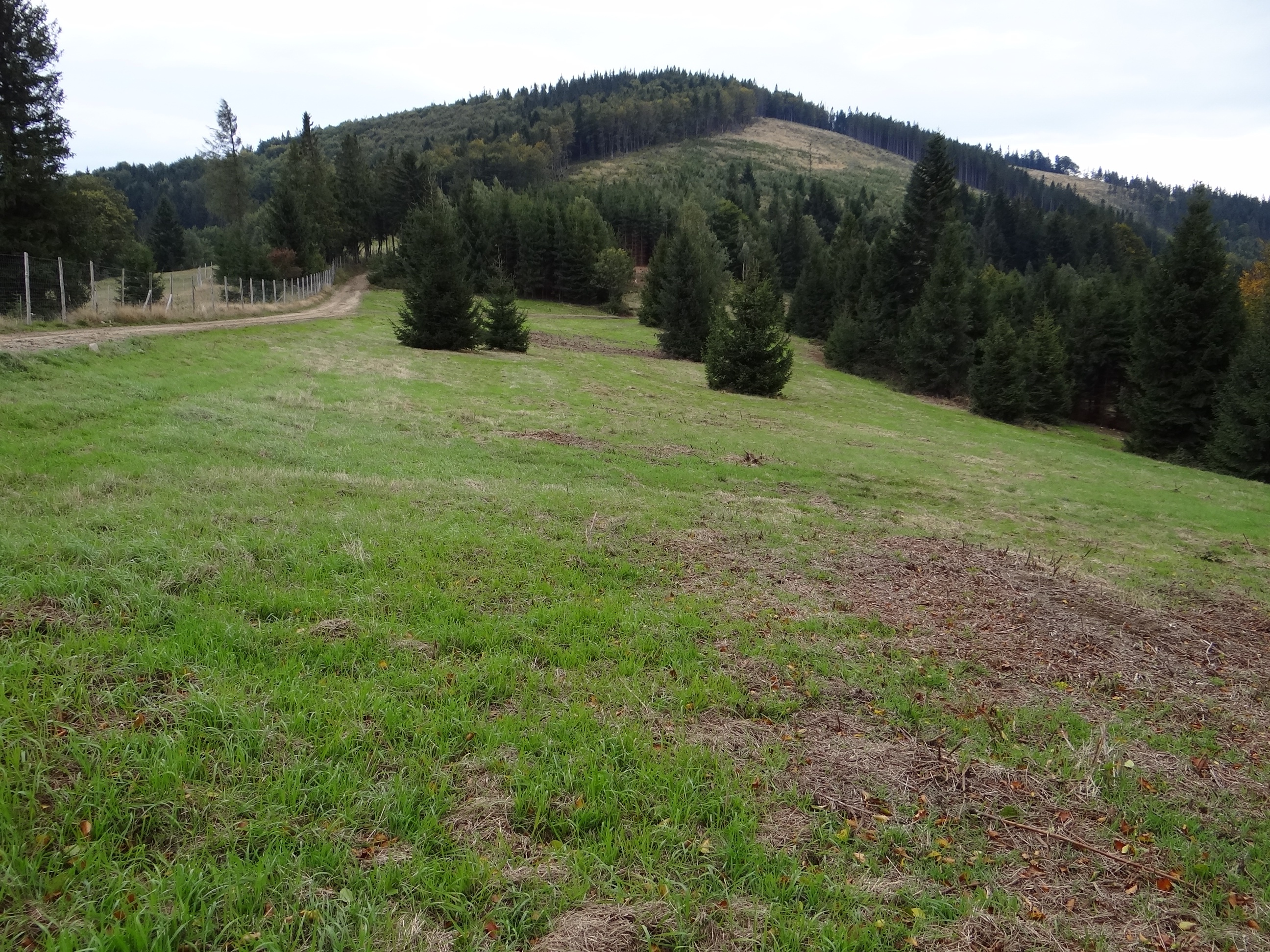 Dawna Hala Borucz w Żabnicy